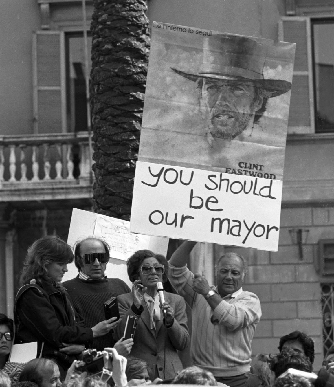 Roma - Claudio Villa a Piazzza di Spagna manifestazione anti fast food